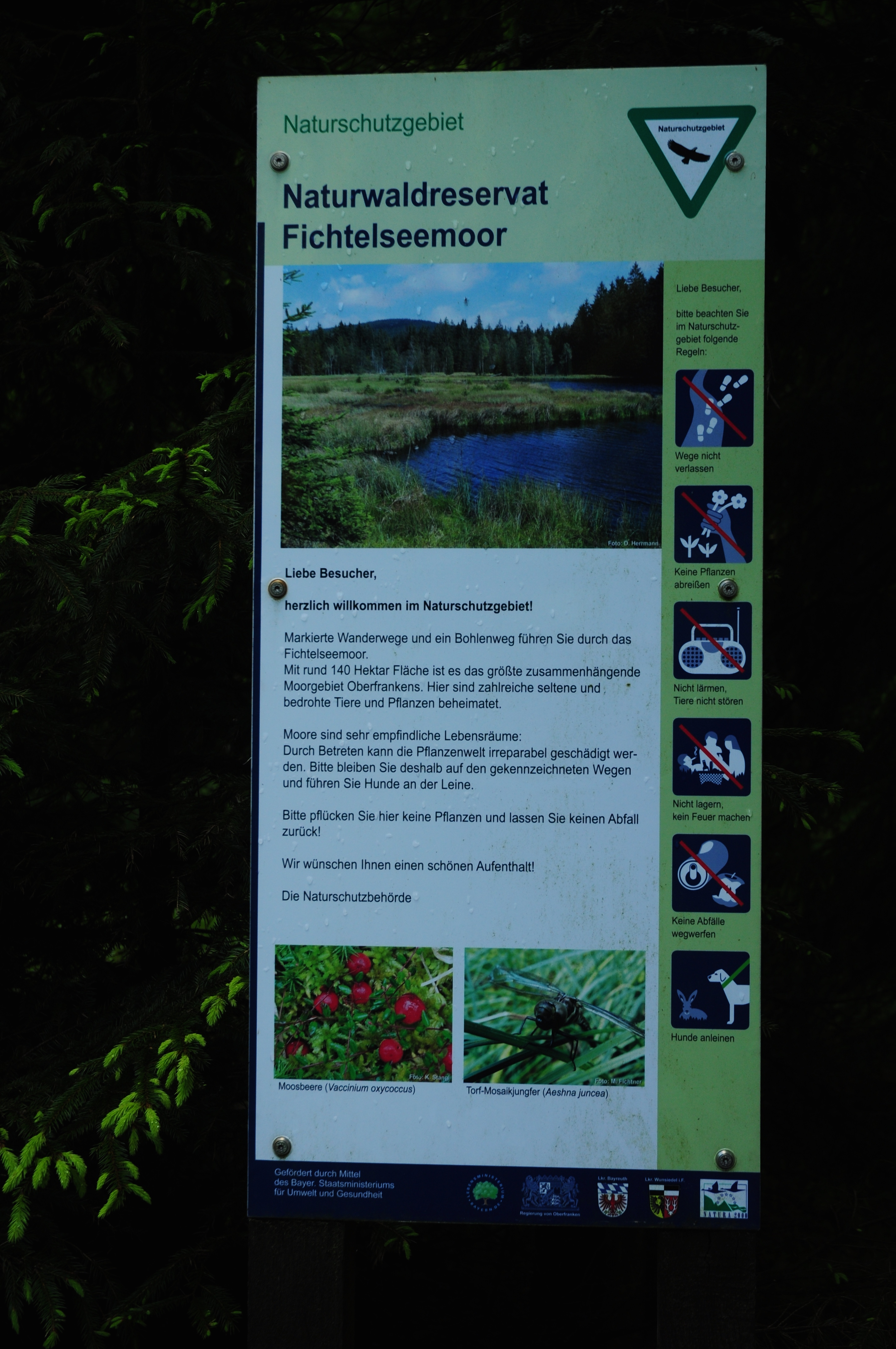 Naturwaldreservat Fichtelseemoor (NSG 00155.01), nach stundenlangem Regen läuft das Wasser über alle Wege, Fichtelgebirge